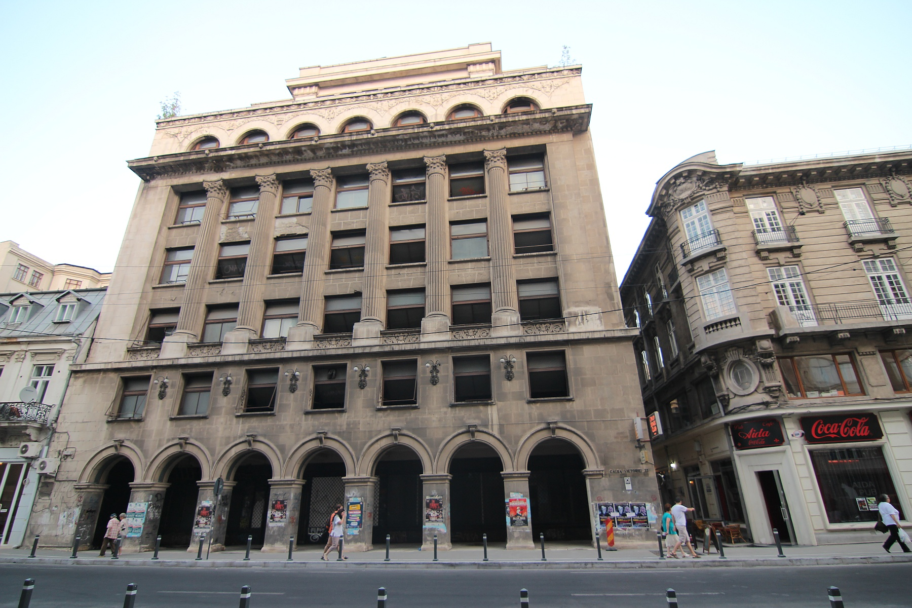 Banca de Comerț Exterior